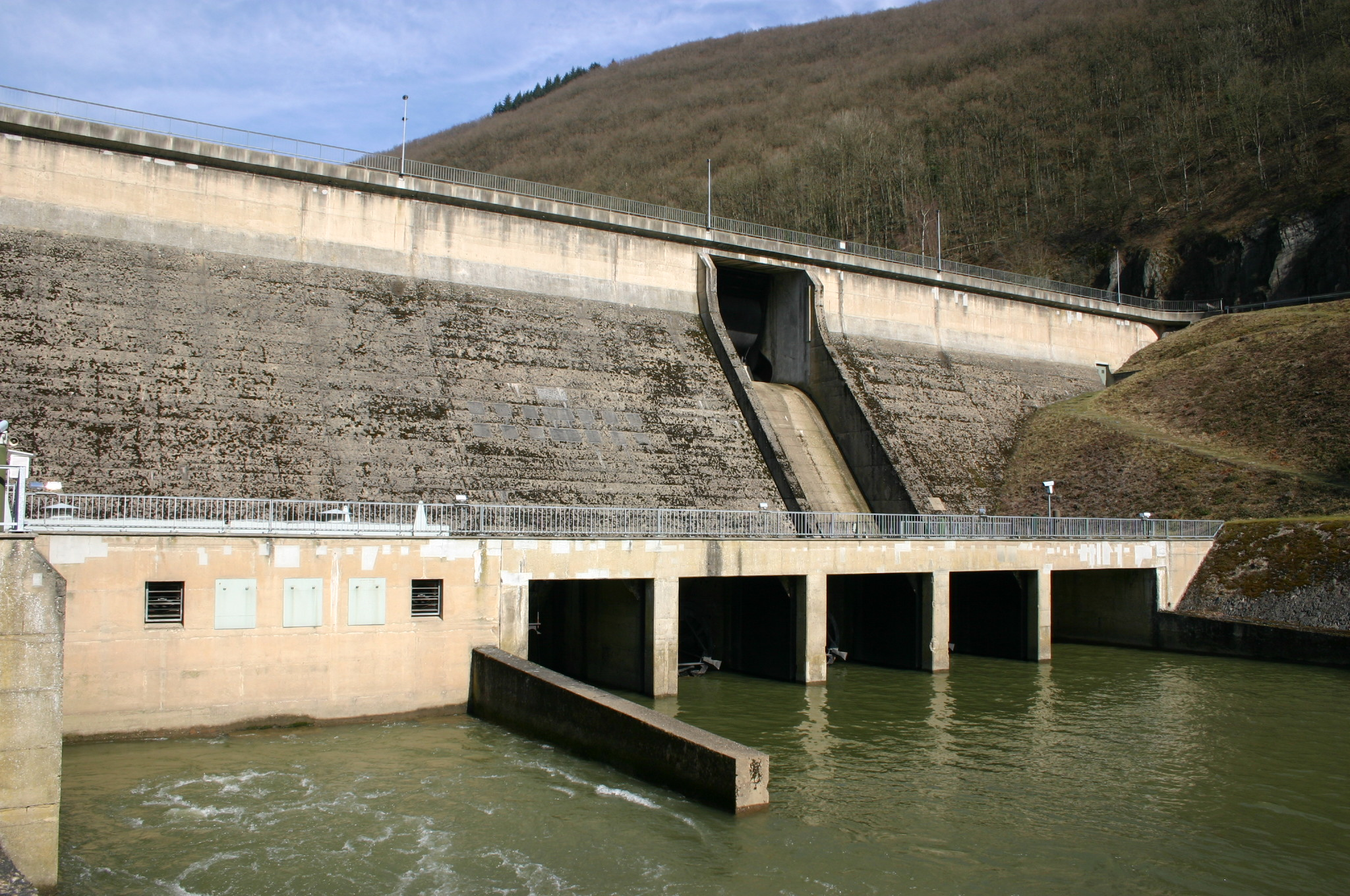 D'Staumauer op der Loumillen am Mäerz 2006. Kategorie:Barragen zu Lëtzebuerg Kategorie:Gemeng Veianen